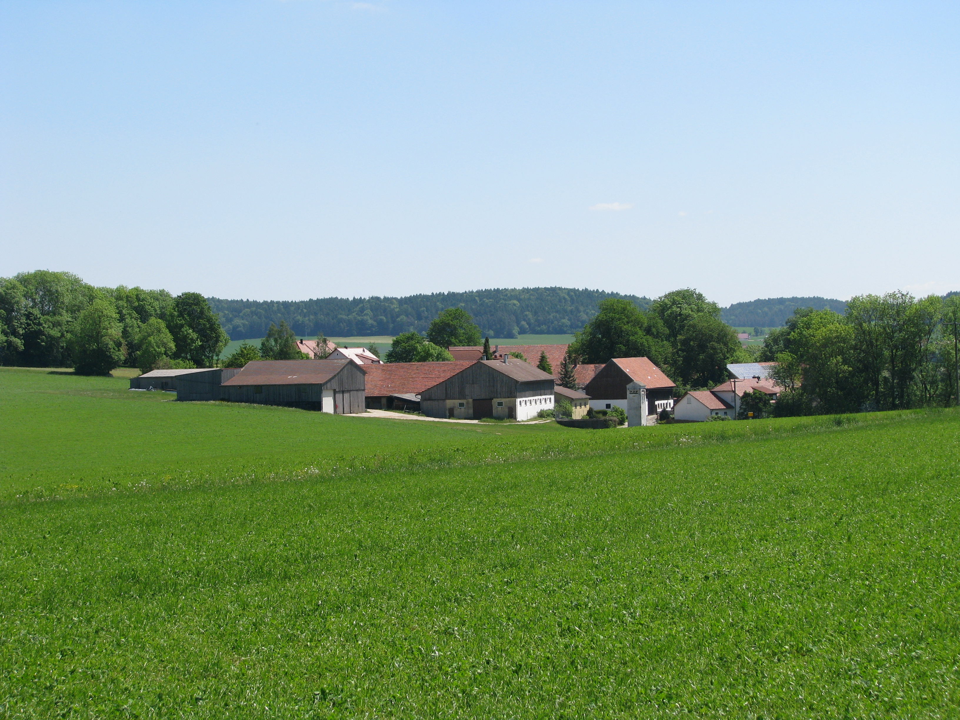 Habertshofen, Gemeindeteil von Pilsach im Landkreis Neumarkt i. d. Opf.